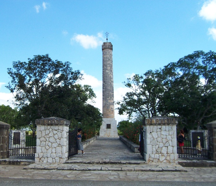 Monumento mangos baragua